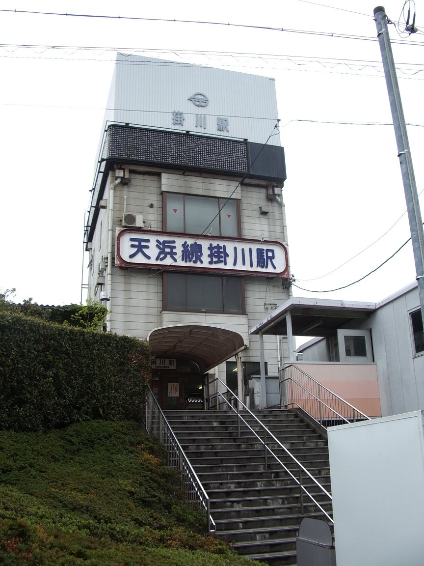 Kakegawa Station Bldg. (Tenryu-hamanako Rail)